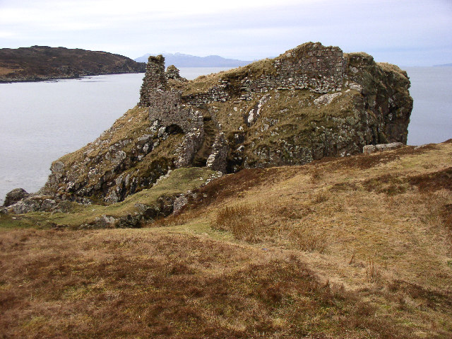 Dunscaith